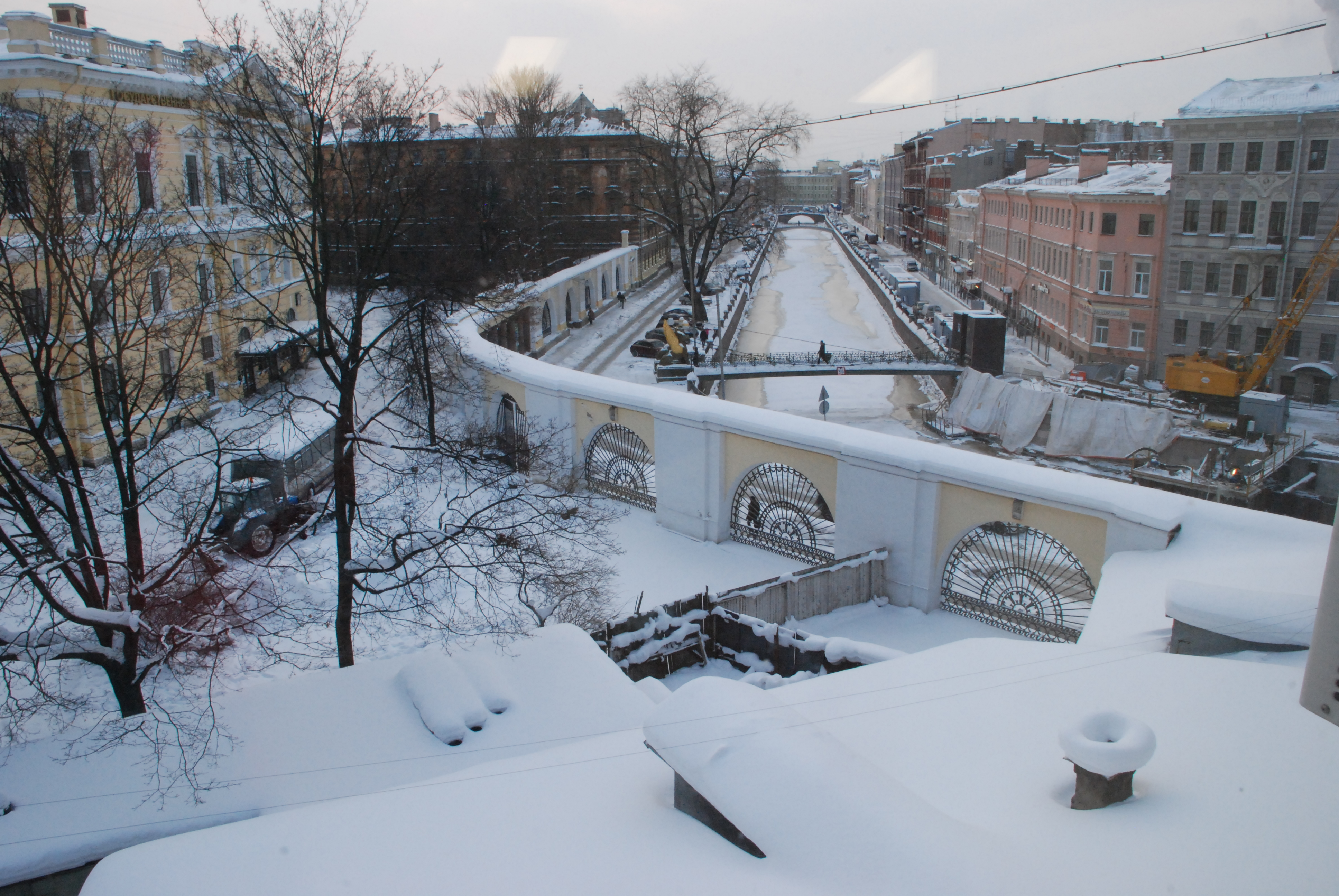 Вид из окна StArtАкадемии зимой 2011